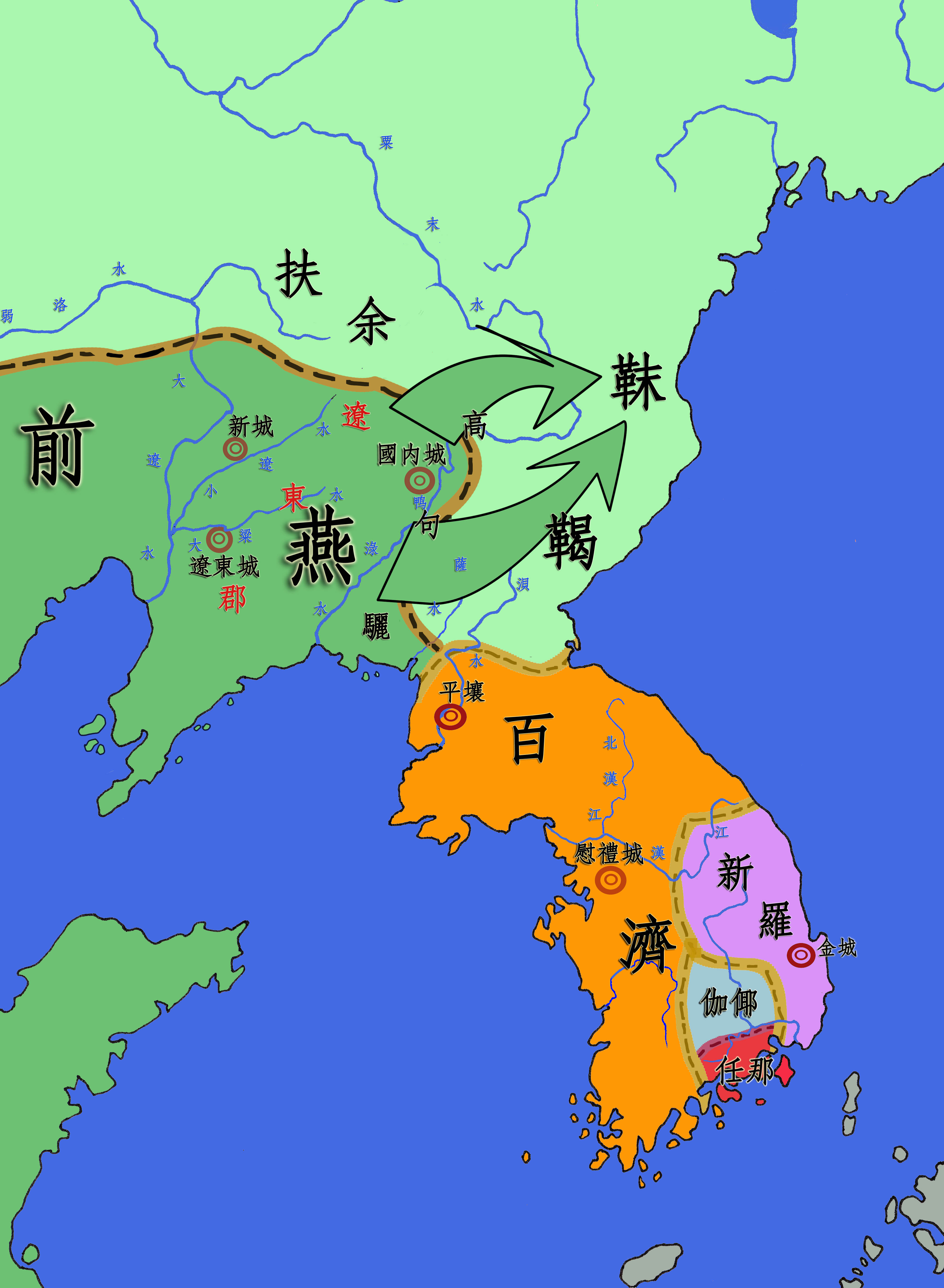 Former_Yan(前燕).jpg对东北的控制